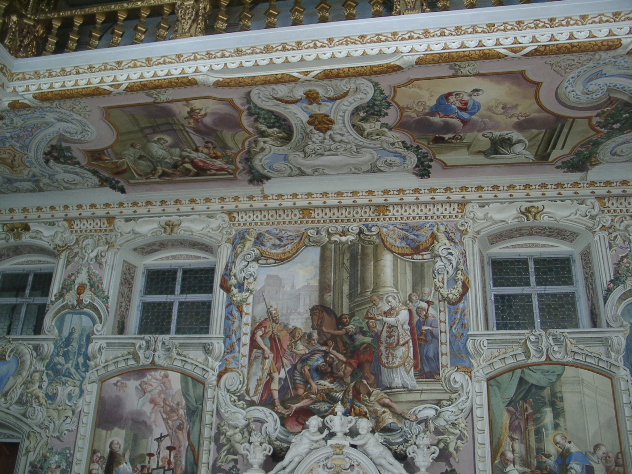 Stift Stams, Inneres